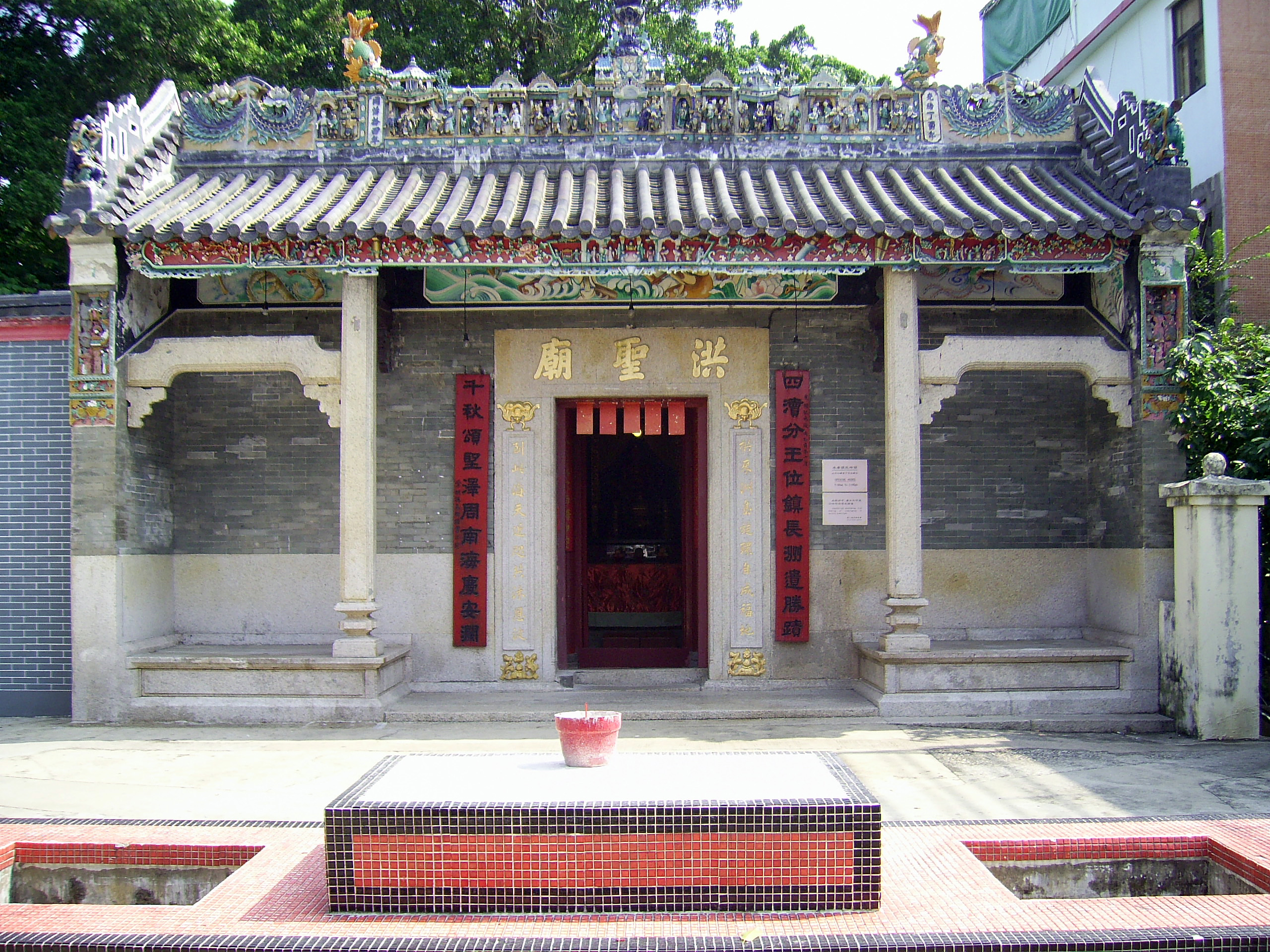 中文（香港）: 長洲洪聖廟